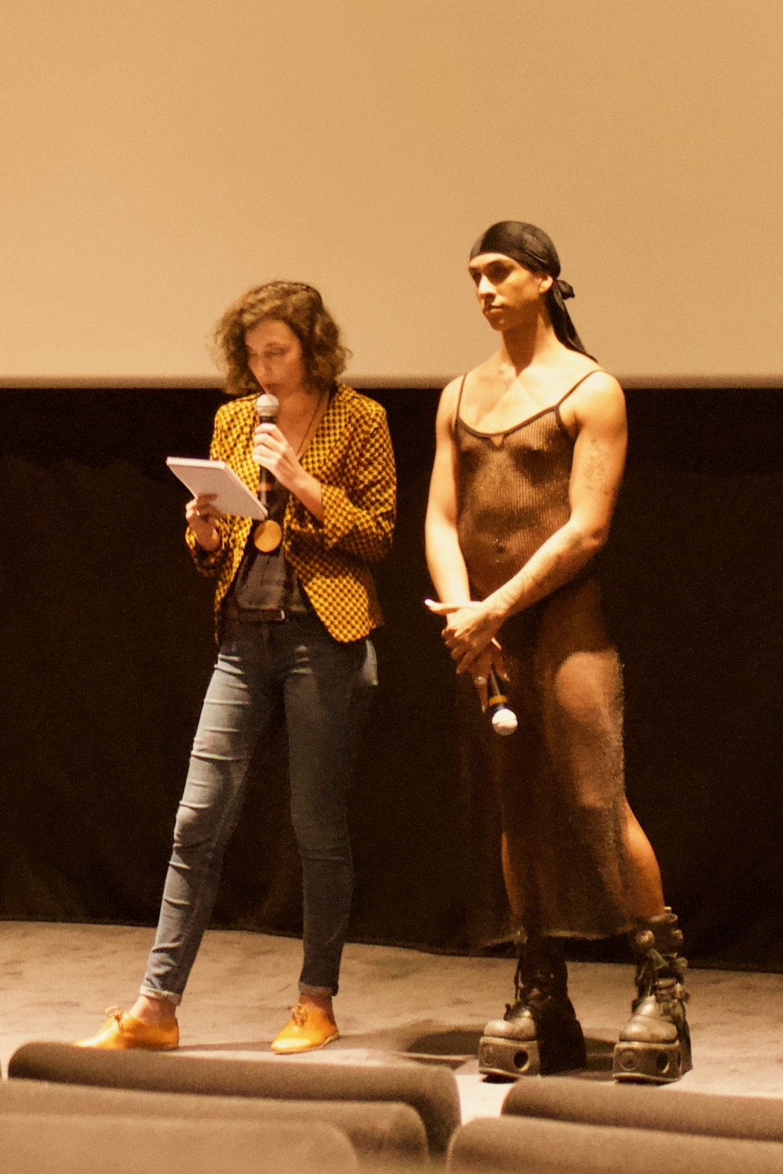 Linn da Quebrada en un teatro de Montreuil, en el Gran París, Francia durante mayo de 2019